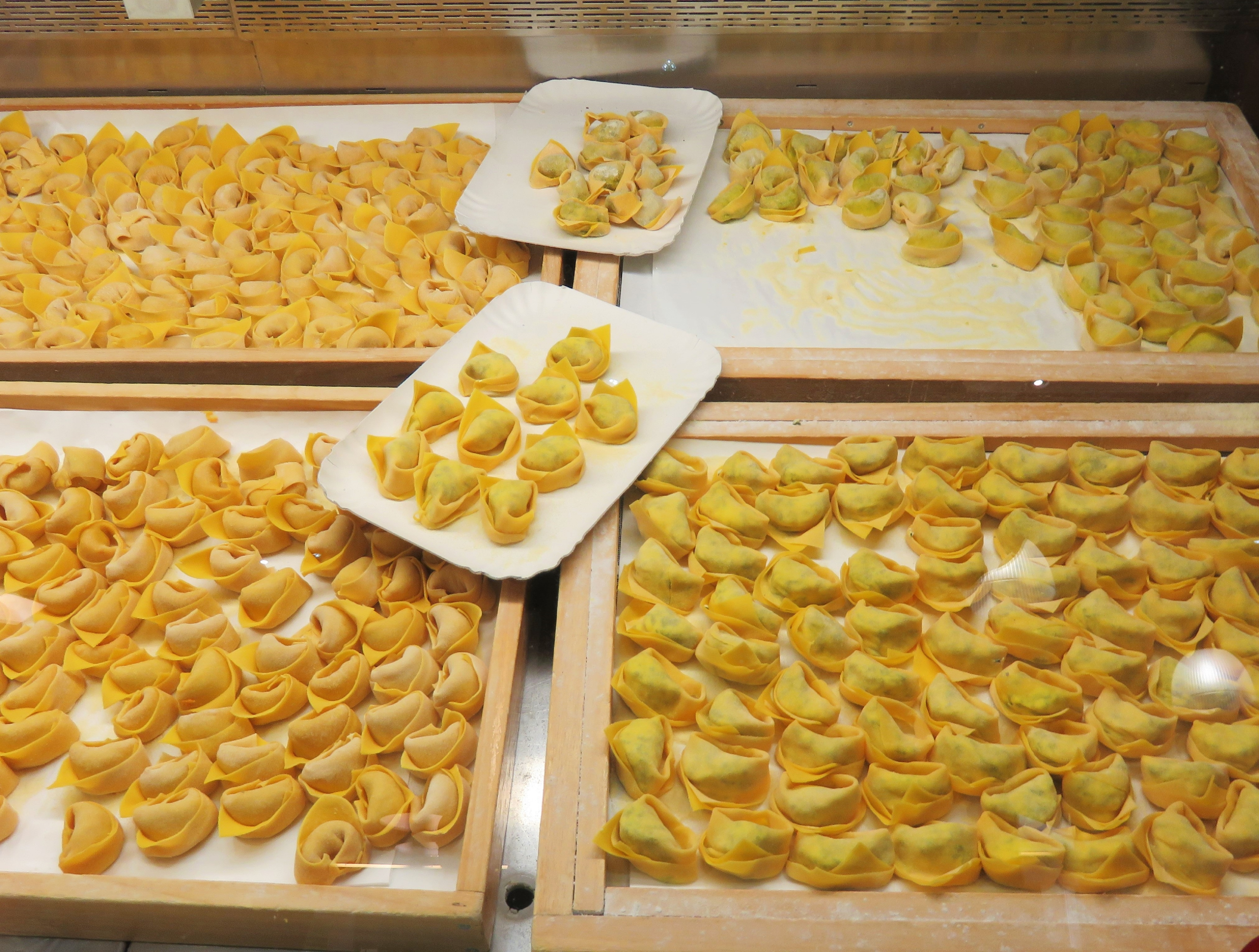 pasta ripiena tipica tradizionale ferrarese